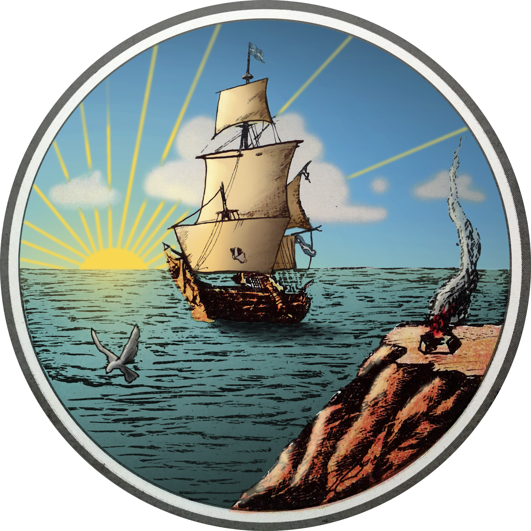 Versión estilizada y actualizada del antiguo escudo creado en 1914 por José Luis Chiogna. Representa al Partido de Quilmes y a cada una de sus ciudades.